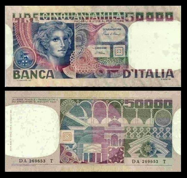 £ 50000 (Volto di donna)